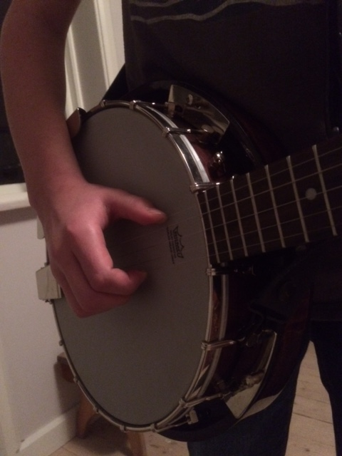 Korrekt handhållning vid spelning av clawhammer.